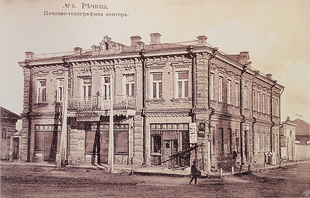 Беларуская (тарашкевіца): Рэчыца (Rečyca), пляц Рынак (plac Rynak). Паштова-тэлеграфная кантора